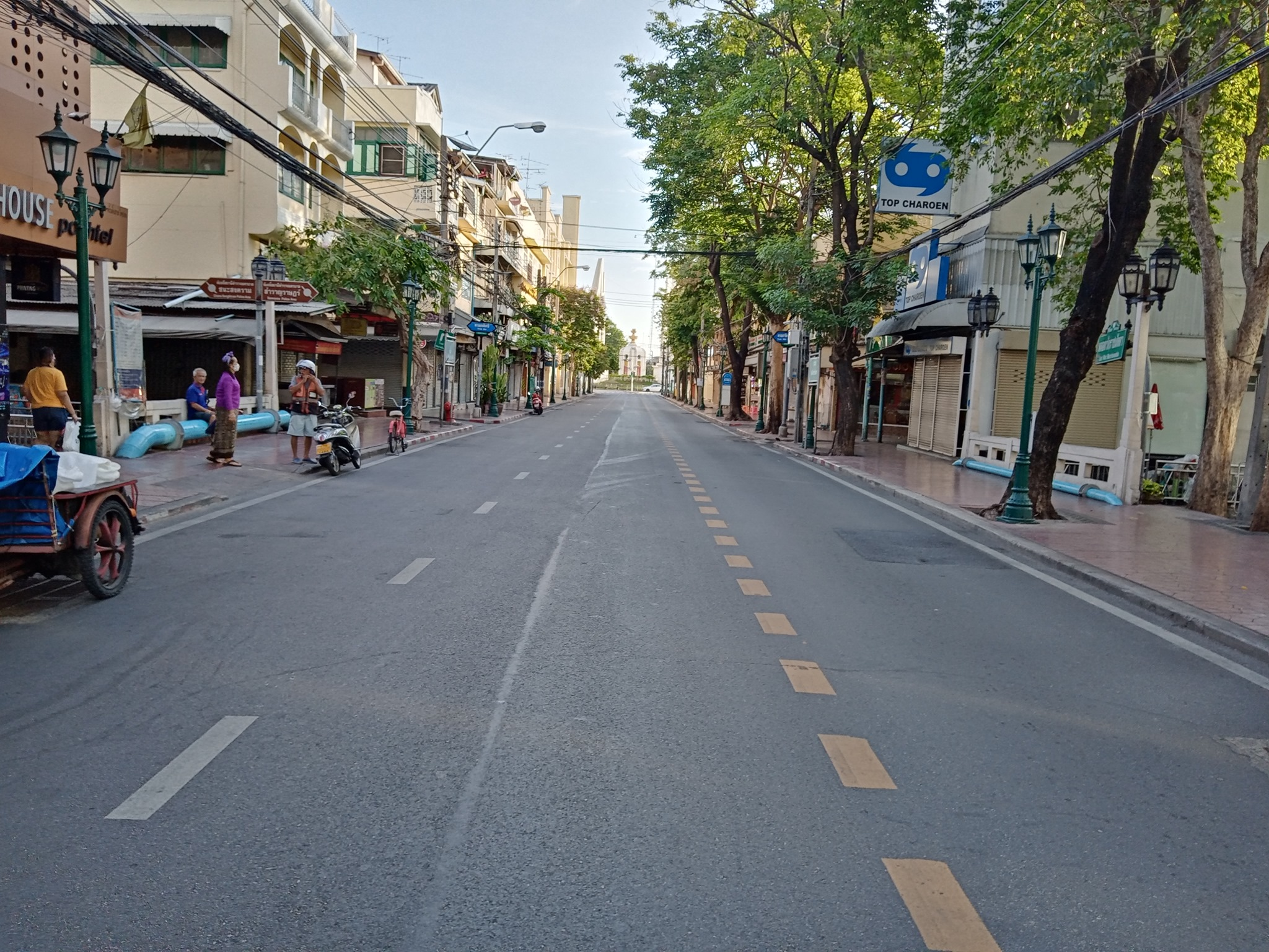 Dinso Rd. BKK.